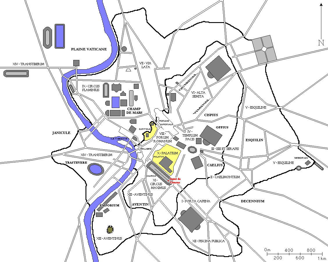 Plan de Rome redessiné à partir de diverses sources. Tous les bâtiments importants construits jusqu'à la fin de l'Empire romain sont dessinés, ainsi que les régions d'Auguste et les collines de Rome. Auteur : ColdEel En rouge, l'Autel de Consus